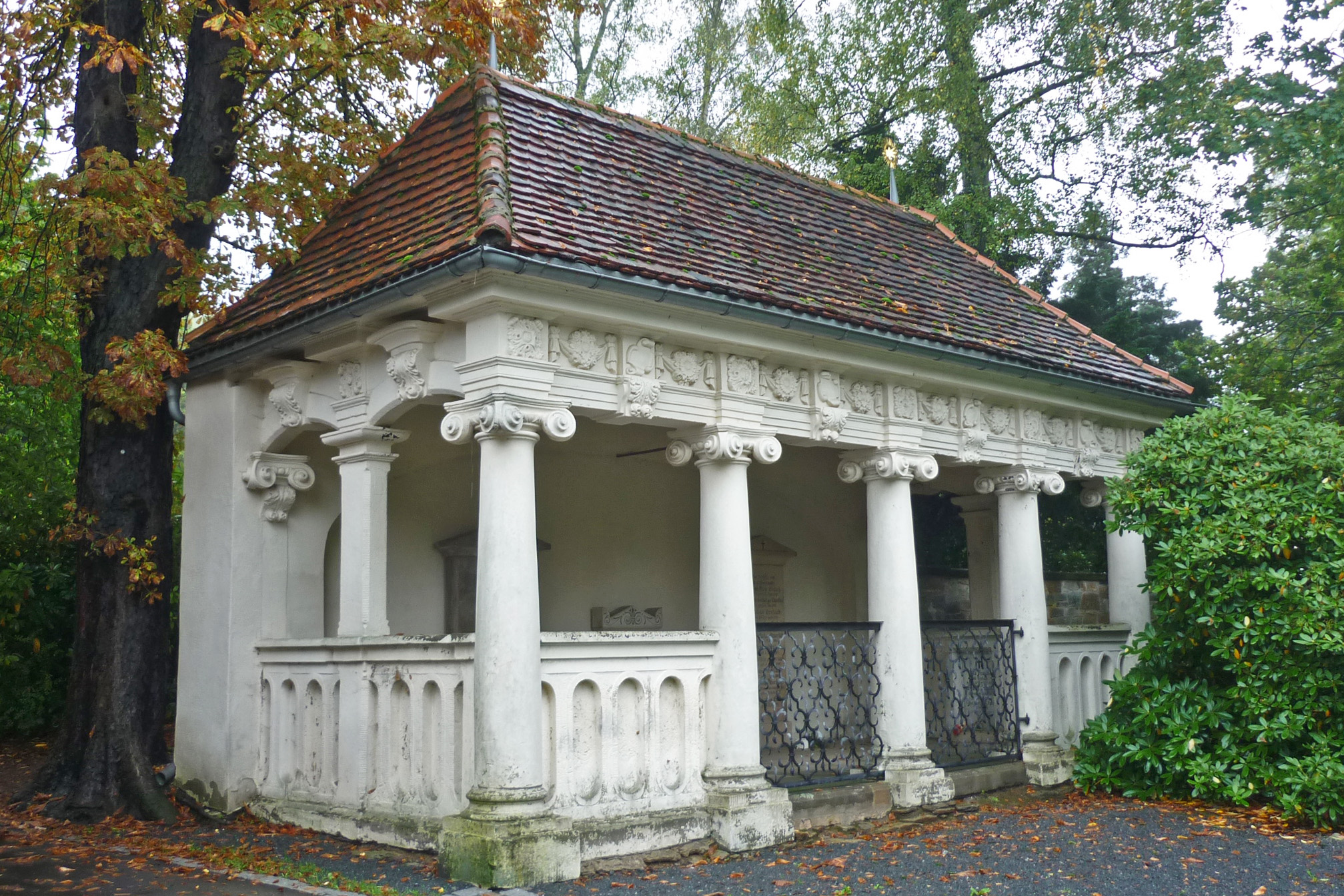 Grufthaus auf dem Donatsfriedhof in Freiberg (Sachsen)